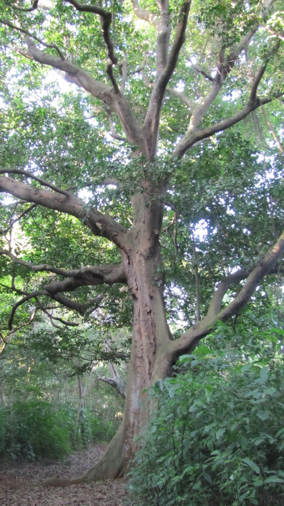 Celtis mildbraedii, Pigeon Valley, May 2013